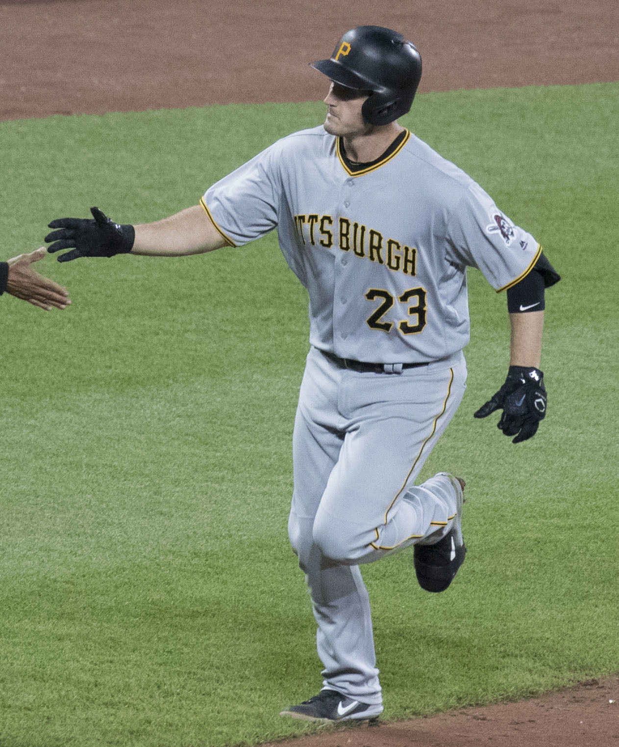 Pirates at Orioles 6/6/17